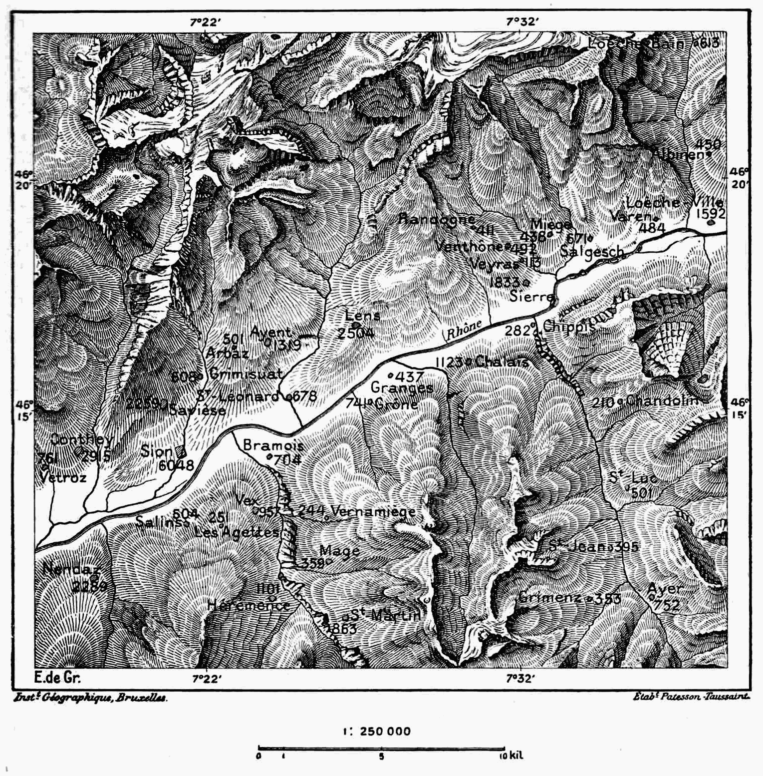 carte des deux Versants du Valais.